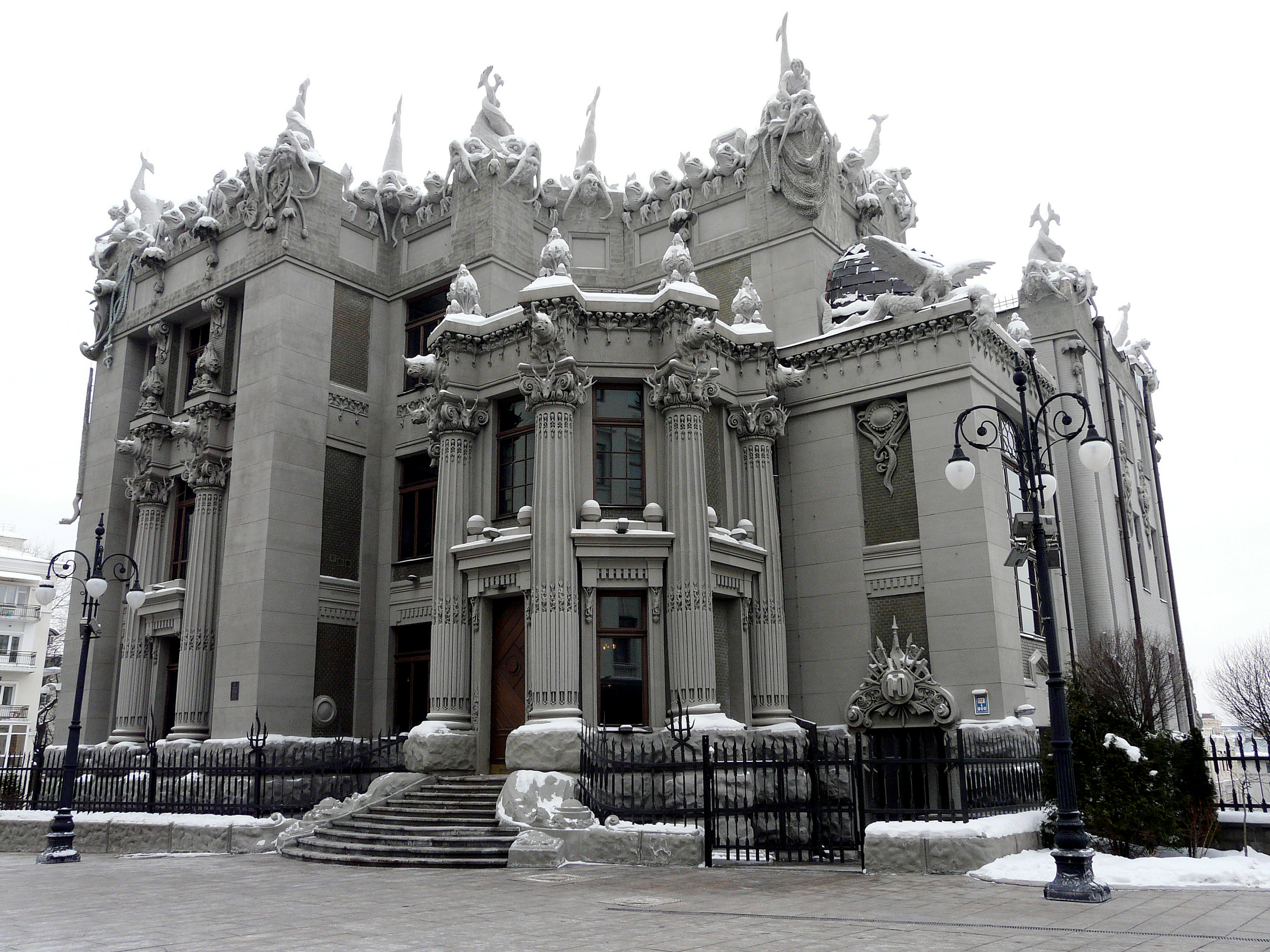 Будинок прибутковий, в якому жив В. В. Городецький, архітектор, Київ, Банкова вул., 10